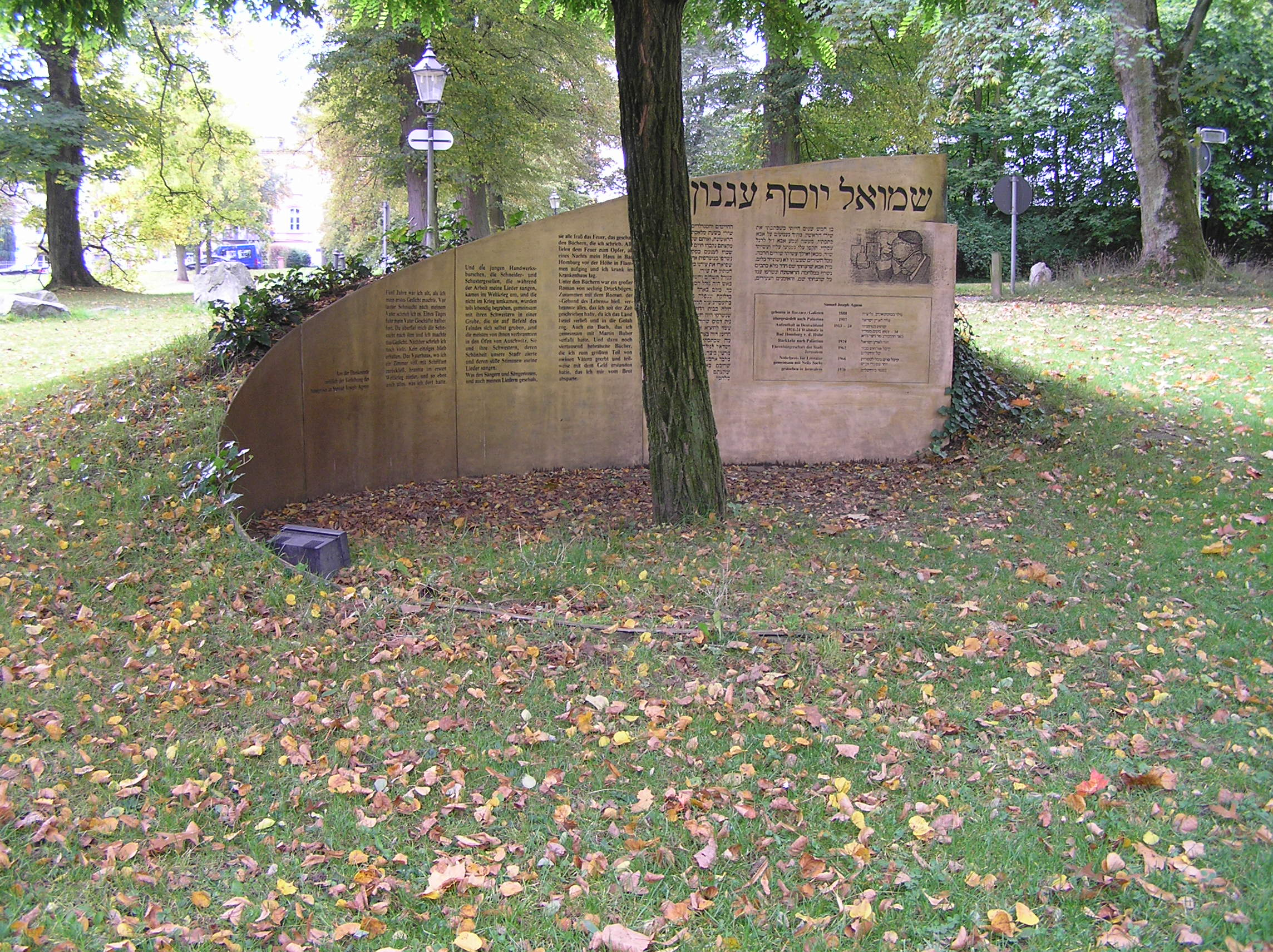 Denkmal Samuel Agnon Bad Homburg, geschaffen 1993 von Dina Kunze